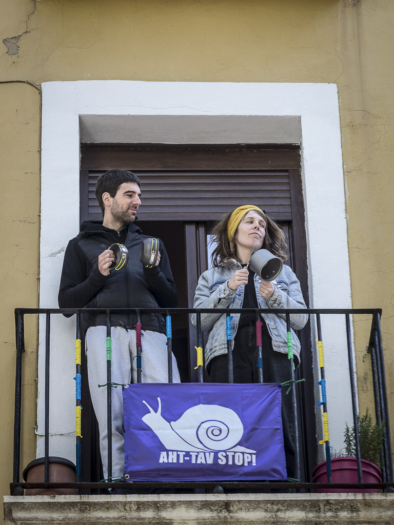 Espainiako Armada Iruñean, COVID-19aren pandemian. Irudi guztiak ikusteko